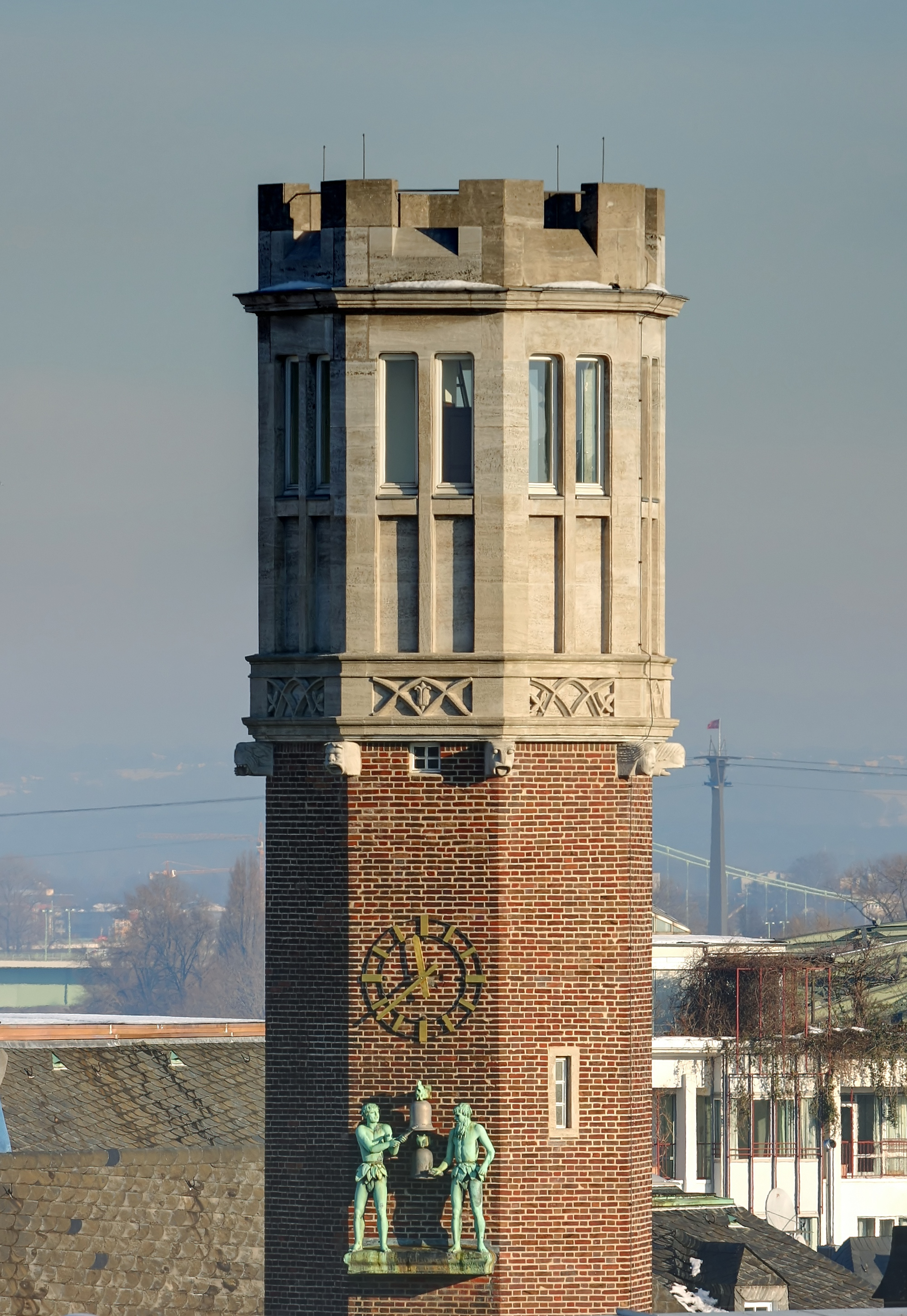 Haus Neuerburg, Köln. Ansicht des Treppenturmes. Architekt: Emil Felix, Baujahr: 1923-29